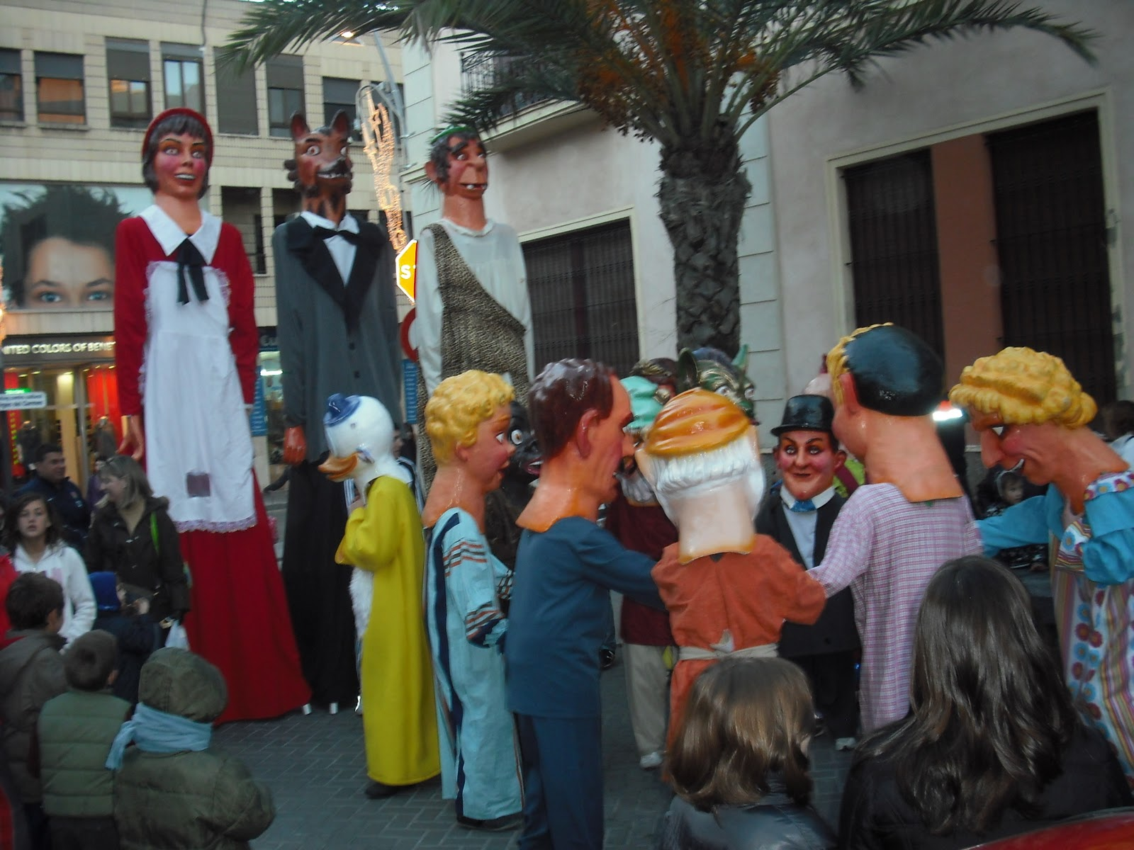 Gigantes y cabezudos (Charamita)